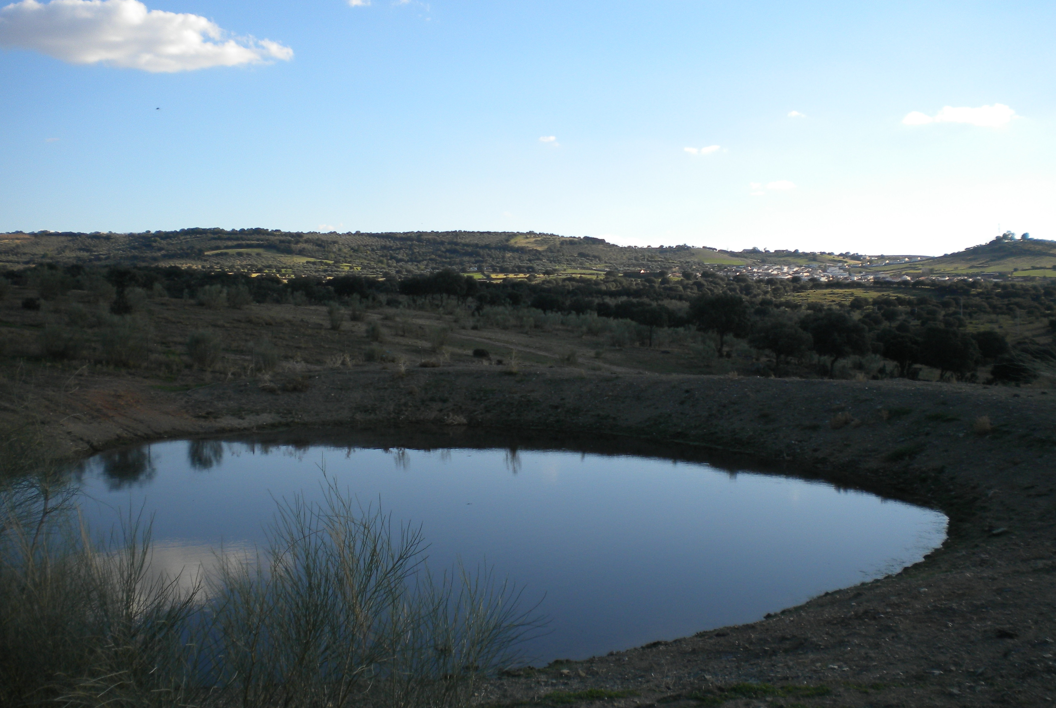 Charca artificial en una finca de Talaván (Extremadura, España)